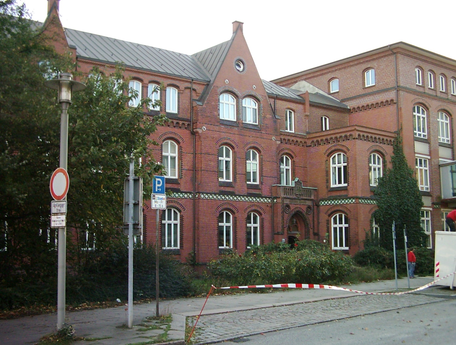 Altes Gebäude der Amtes für Strom- und Hafenbau (heute Hamburg Port Authority) in der Dalmannstraße, Hamburg-HafenCity. This is a photograph of an architectural monument.